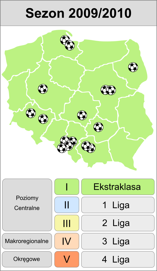 Jagiellonia w sezonie 2009/2010 - mapa